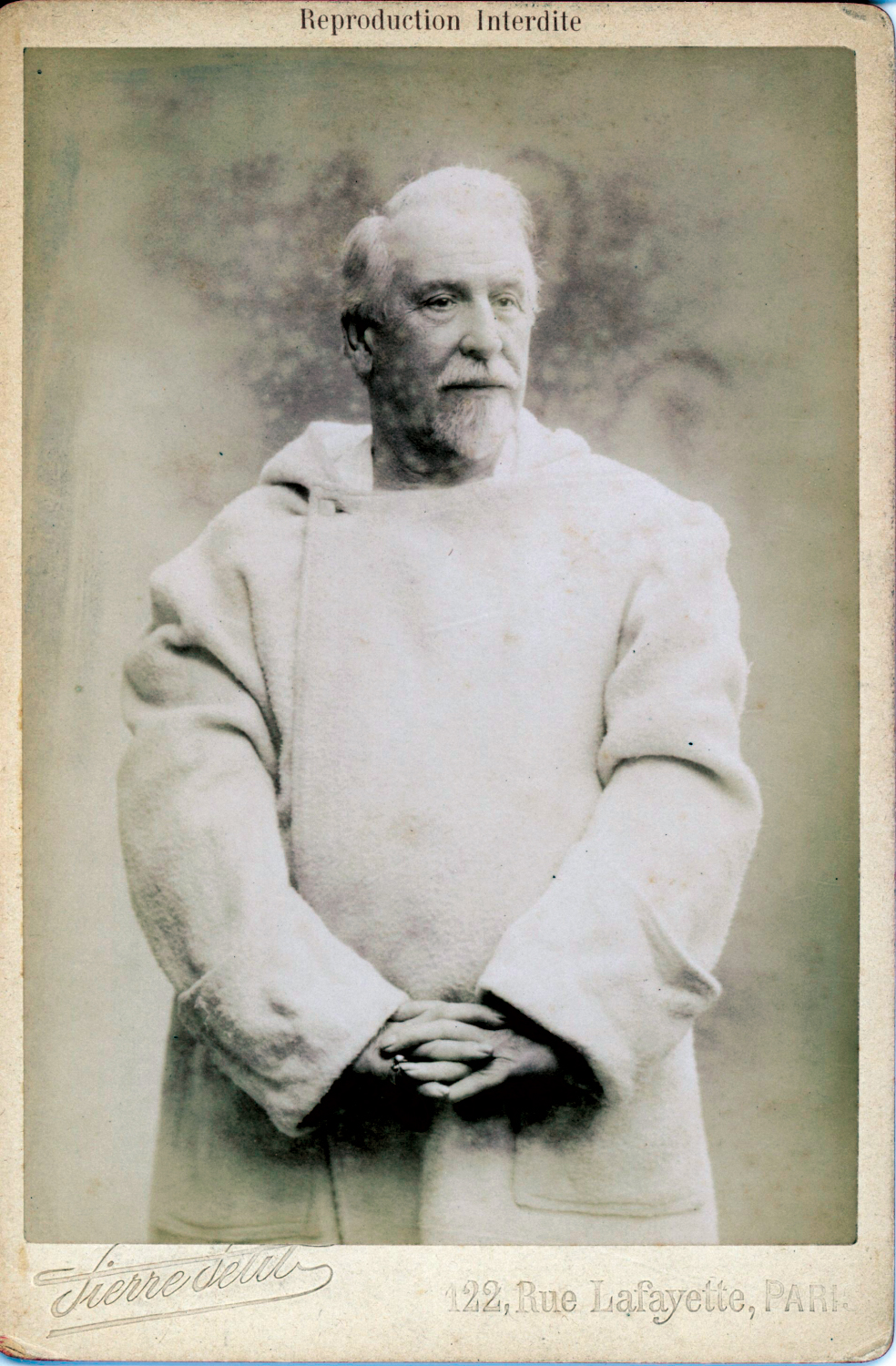 Albumen print.